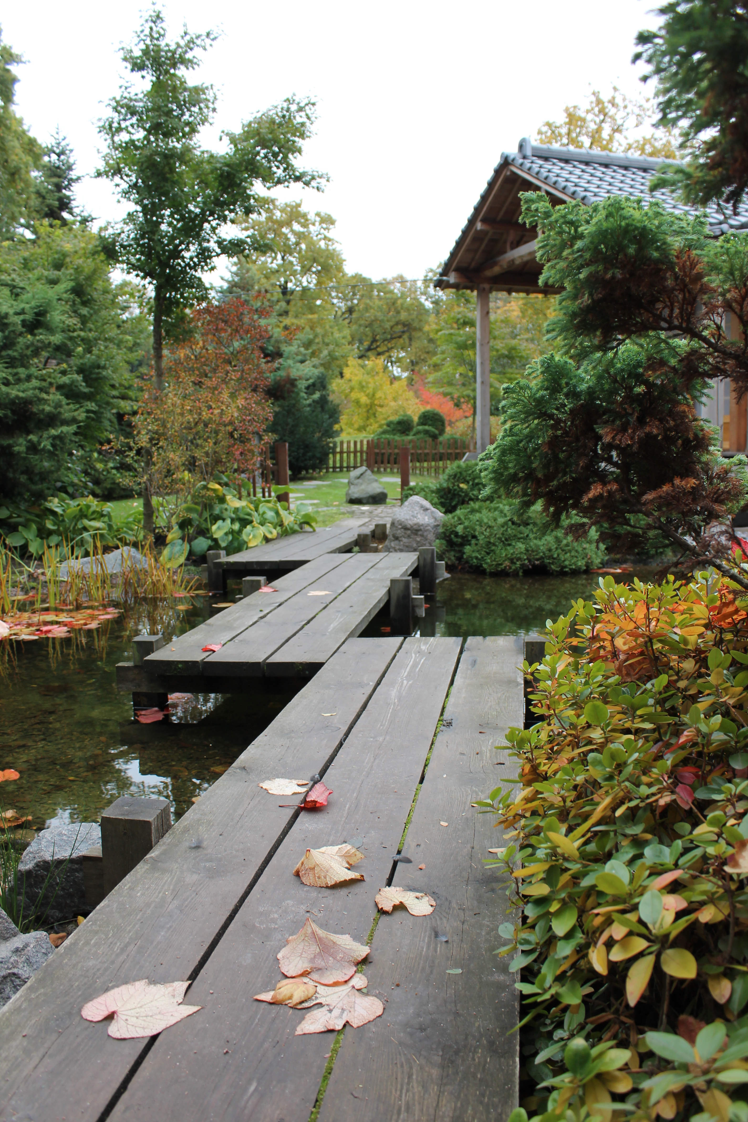 Ботанический сад ботанического института им. В.Л. Комарова РАН: между Аптекарской набережной, набережной реки Карповки, Аптекарским проспектом и улицей Профессора Попова, Петроградский район, Санкт-Петербург This image is related to the protected area of Russia number 7800036